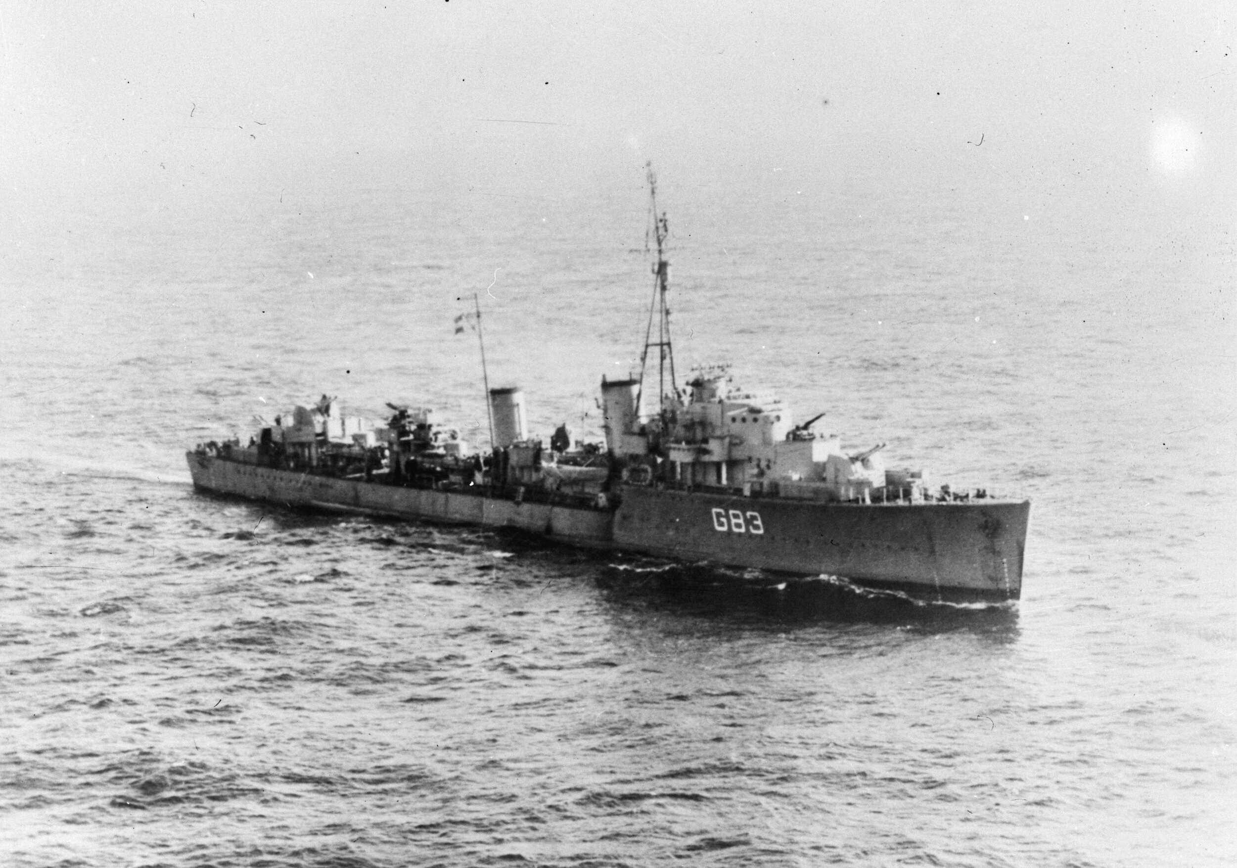 Collectie / Archief : Fotocollectie Anefo Reportage / Serie : [ onbekend ] Beschrijving : Luchtopname. Torpedobootjager Hr. Ms. "Isaac Sweers" Datum : 1940-1942 Locatie : Groot-Brittannië Trefwoorden : luchtfoto's, marine, oorlogsschepen, tweede wereldoorlog Persoonsnaam : isaac sweers Fotograaf : Onbekend / Publiek Domein Auteursrechthebbende : Nationaal Archief Materiaalsoort : Negatief (zwart/wit) Nummer archiefinventaris : bekijk toegang 2.24.01.04 Bestanddeelnummer : 934-9831